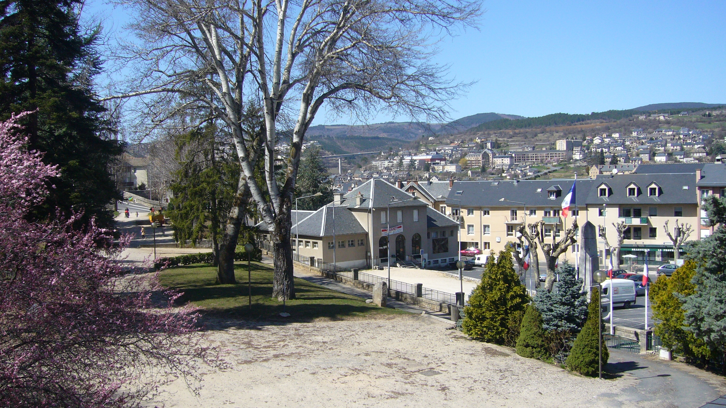 Vue d'une partie de la ville de Mende, Lozère, France.